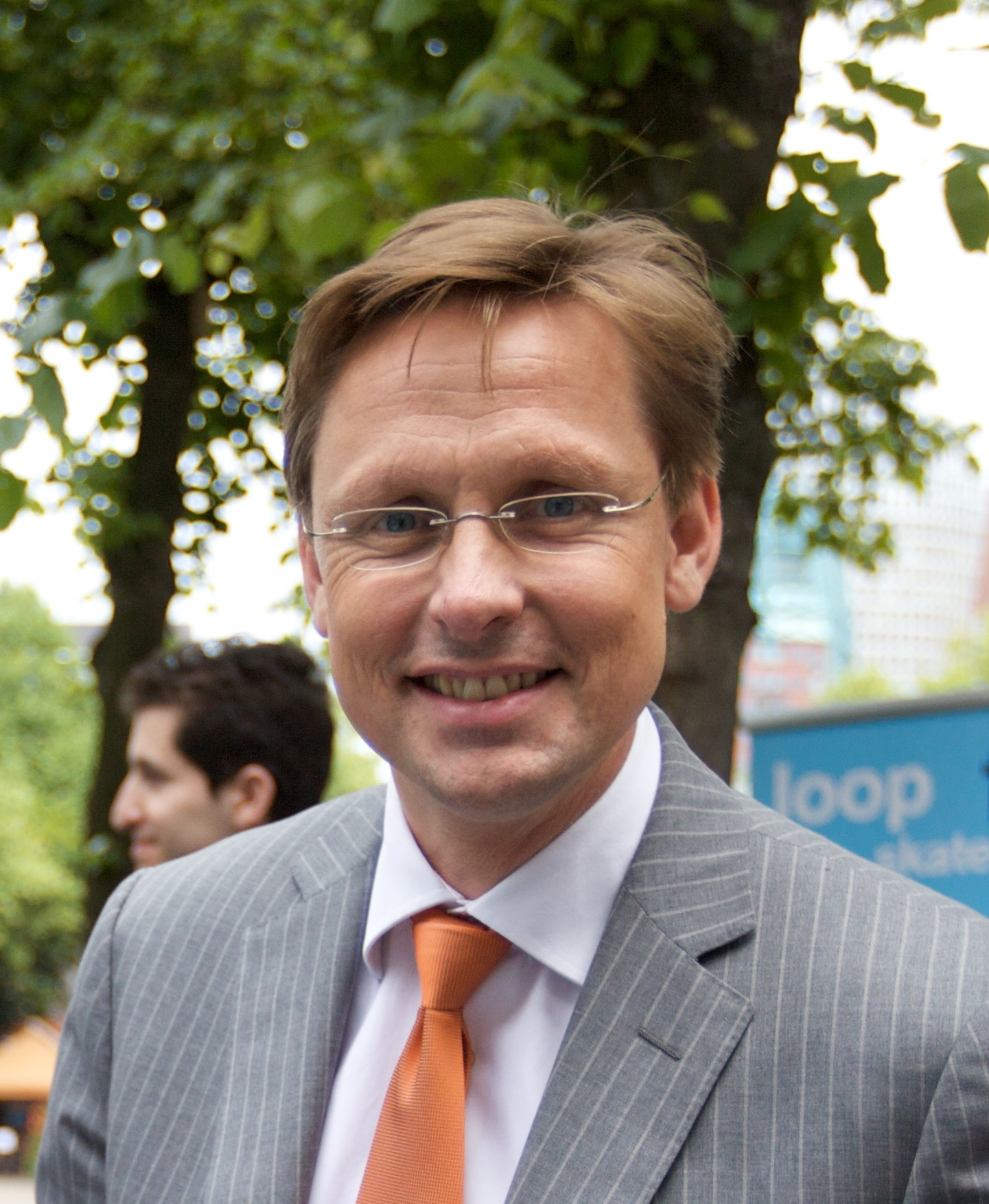 Han ten Broeke